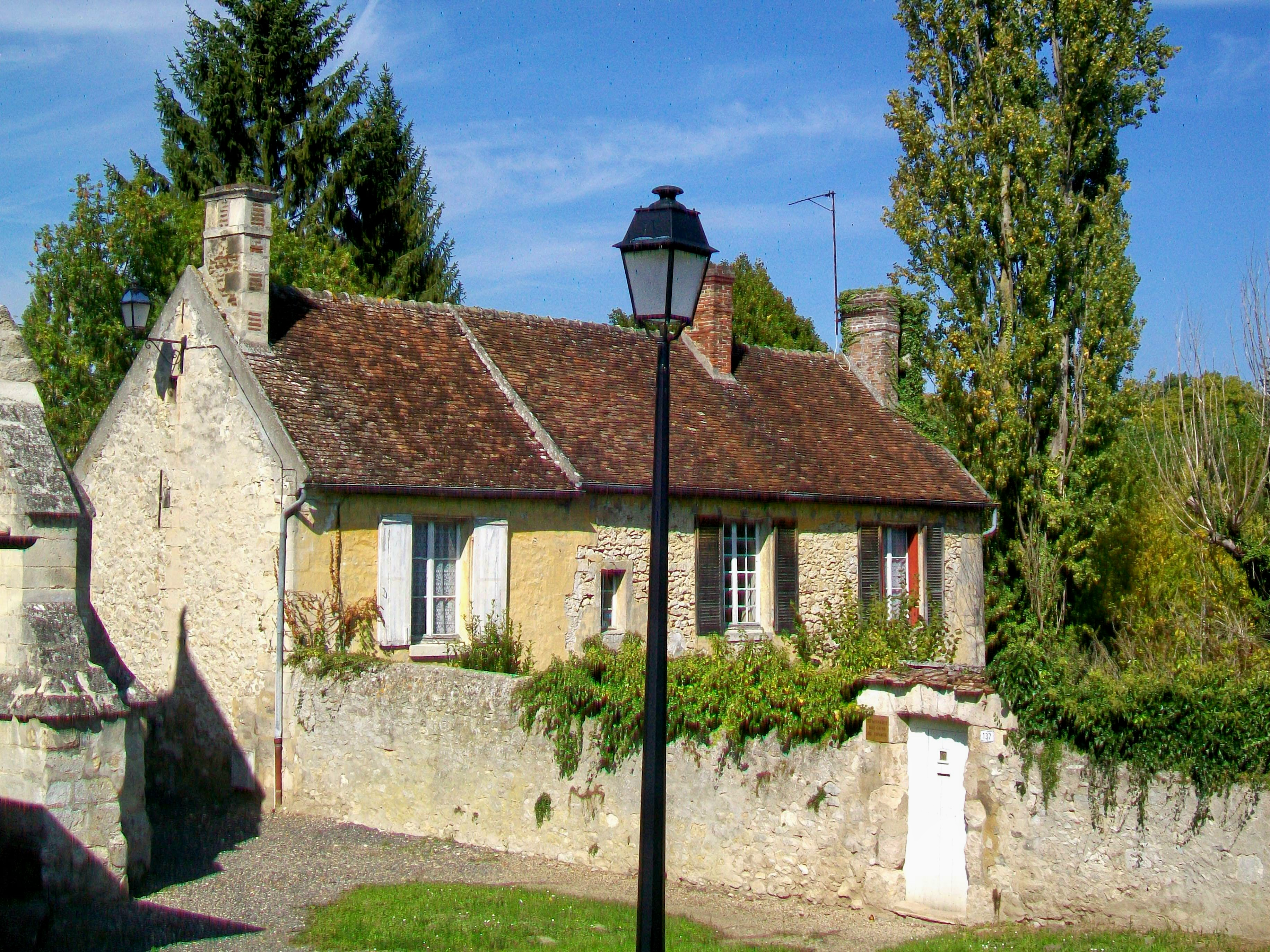 Le presbytère, derrière l'église.